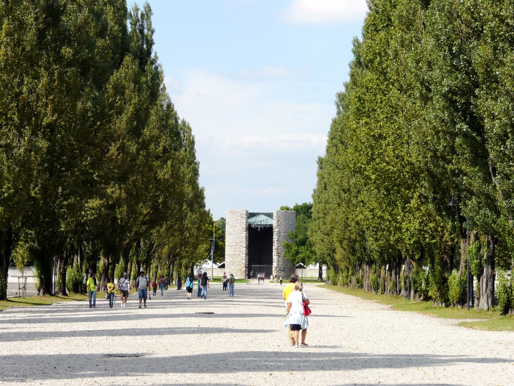 Ehemalige Lagerstraße im Konzentrationslager Dachau. Sie führt vom Appellplatz zu den religiösen Gedenkorten sowie zum Krematorium. Im Hintergrund ist die katholische Todesangst-Christi-Kapelle aus dem Jahr 1960 zu sehen.